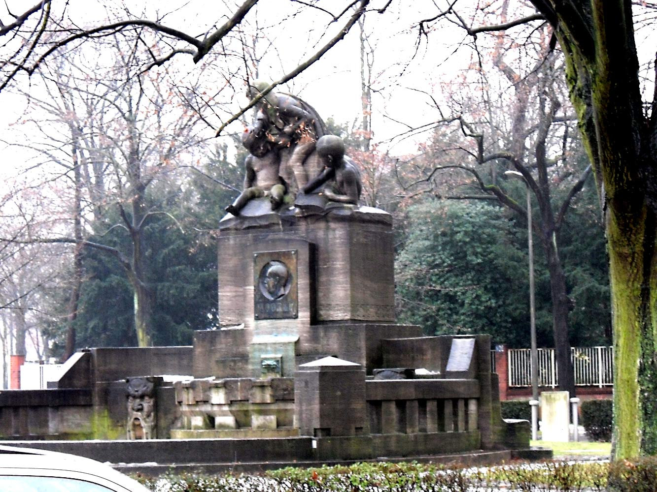 Albert-Mooren-Brunnen in Düsseldorf-Bilk Источник (фонтан) Альберт-Морен в Дюссельдорфе-Бильк